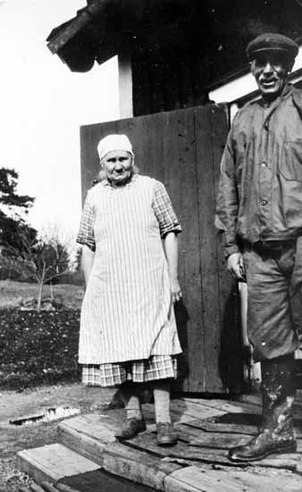 Ålsta båtsmanstorp, Järfälla kommun, Stockholms län. Även kallat Lill-Ålsta eller Ålsta torp. Låg under Ålsta gård. Framför torpet står Johan August Pettersson med hustrun Augusta Maria, född Fahlstedt.